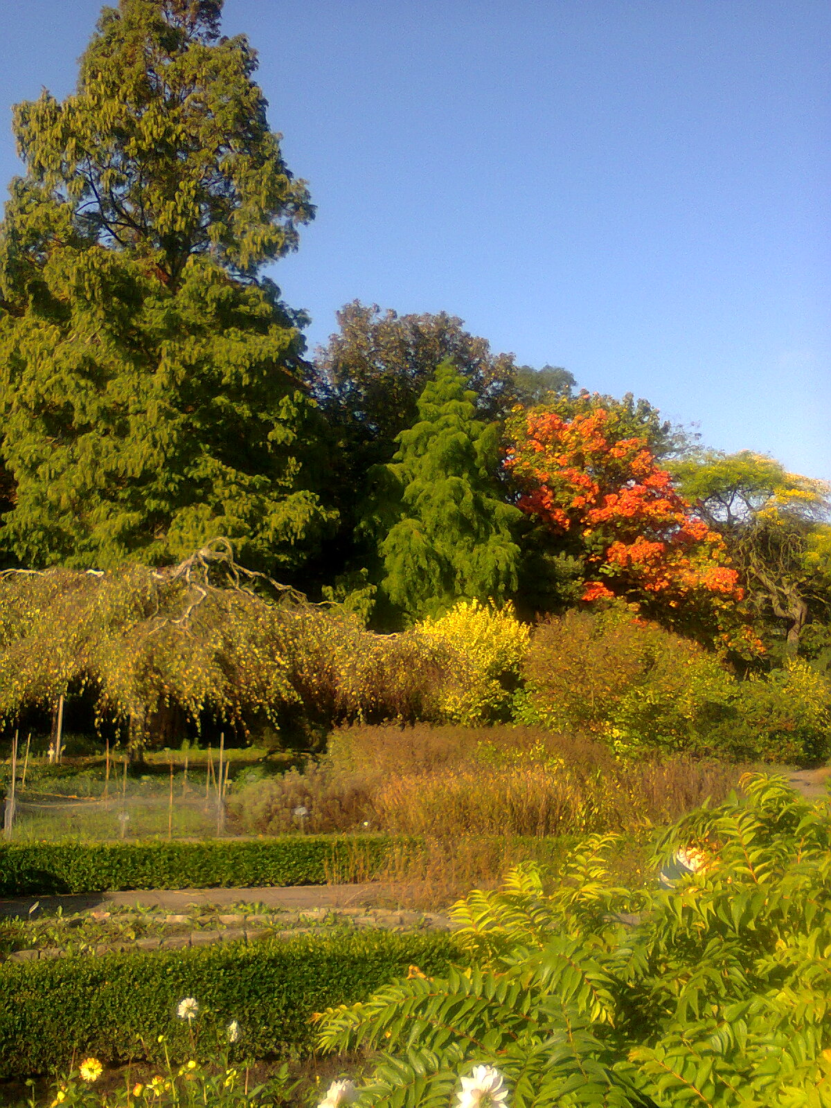 In de Heimans hof staan oudere boomsoorten hier in herfstkleuren